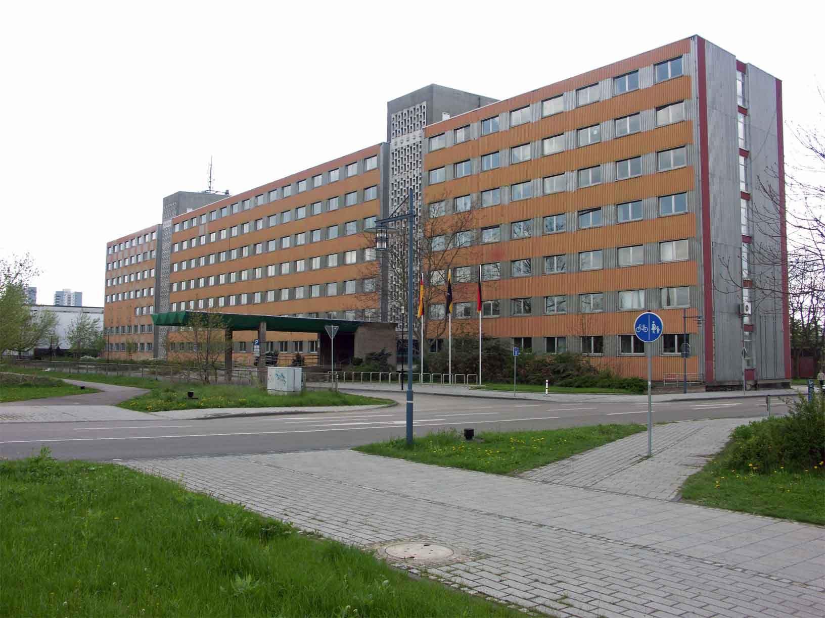 Hauptgebäude der Stasi-Bezirksverwaltung Halle, erbaut ca. 1973 am östlichen Rand von Halle-Neustadt, zuständig für den Bezirk Halle, Gimritzer Damm/ Blücherstraße 1, 06122 Halle (Saale); bis Ende 2015 Nutzung durch das Finanzamt Halle